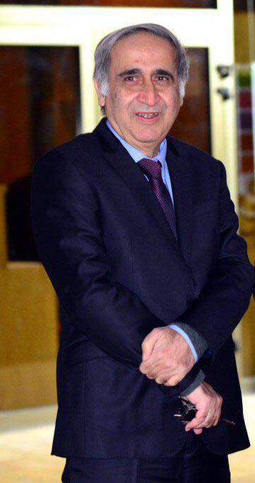 محسن الهامیان - سومین سال نوای موسیقی ایران - ۴ آذر ۱۳۹۶